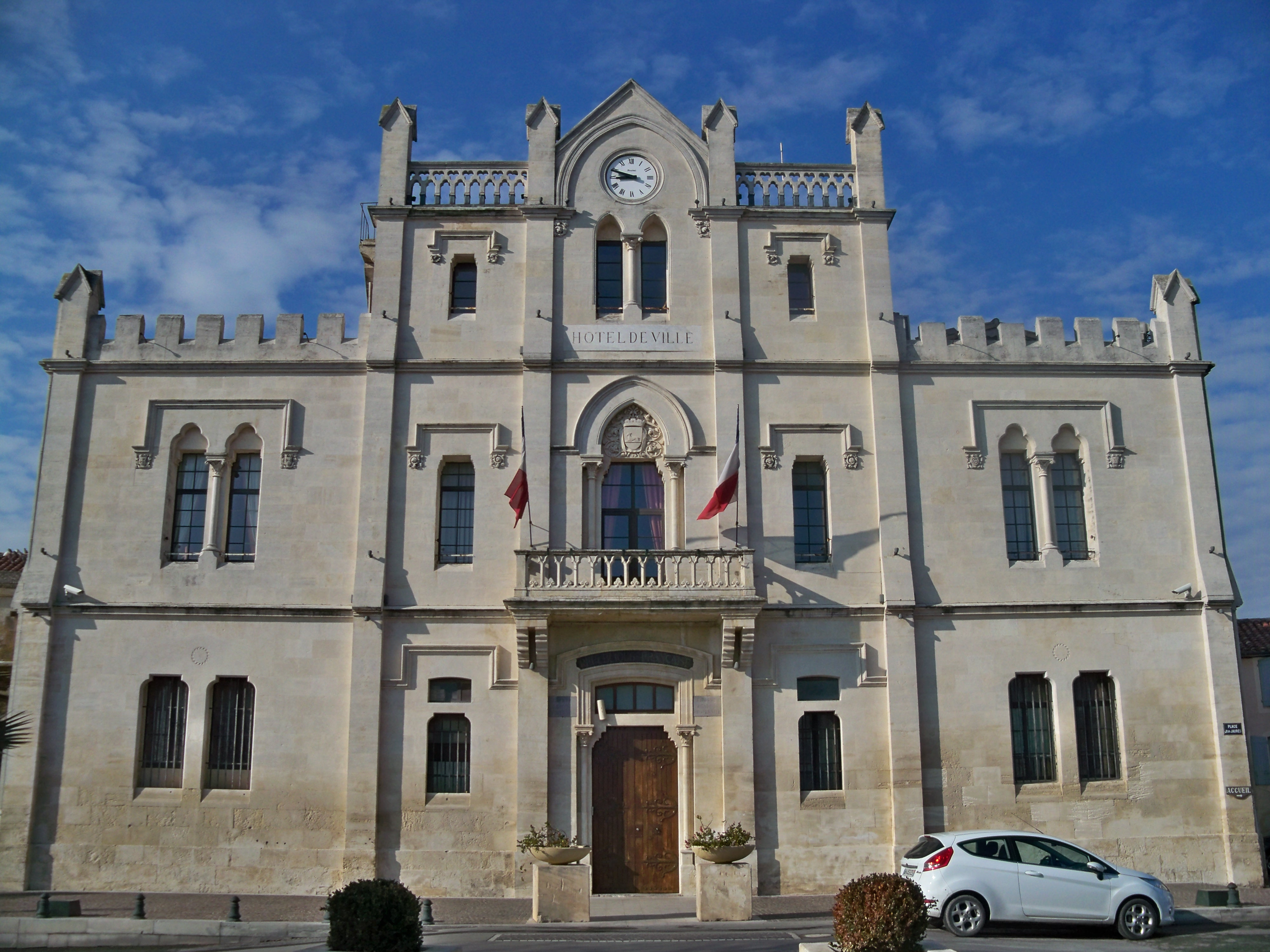 Mairie de Saint Gilles (30)